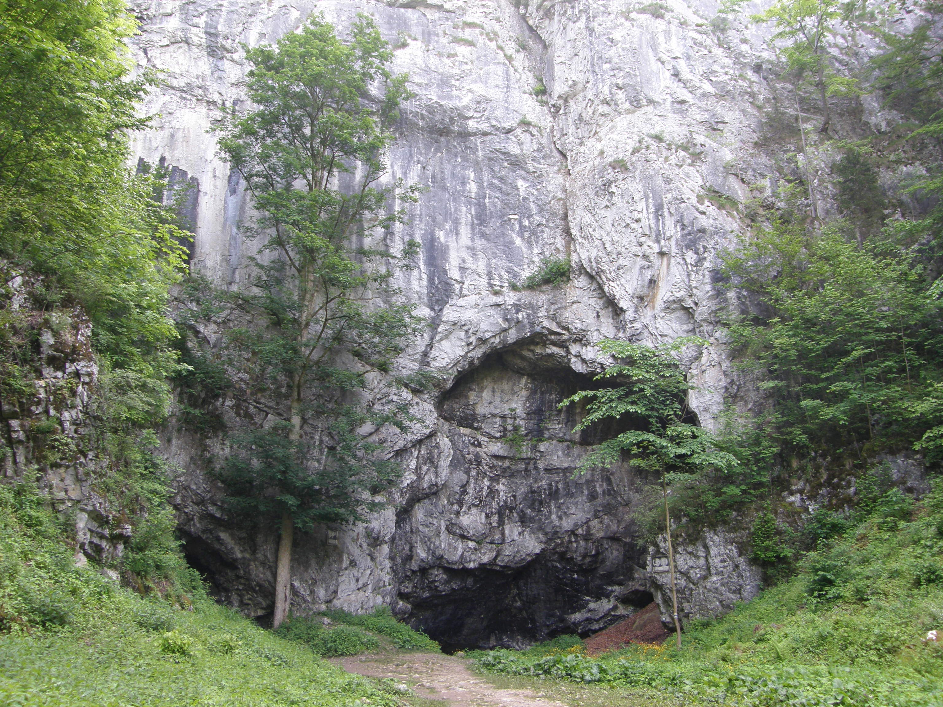 Býčí skála